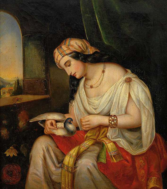 Anonym (Umkreis F. v. Amerling, 19. Jh.): Junge Frau im orientalischer Kleidung mit Brieftaube Oil on canvas, 42 x 35,5 cm